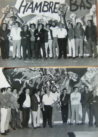 Sessano, Bute, Hugo Pereyra, Franco Venturi, Martínez Howard, Carpani, Alfredo Plank, Alberto Alonso, Mario Erlich, Carlos Alonso, Juan Manuel Sánchez. Mural en la SAAP, Buenos Aires. Acción colectiva: Villa Quinteros. 1969